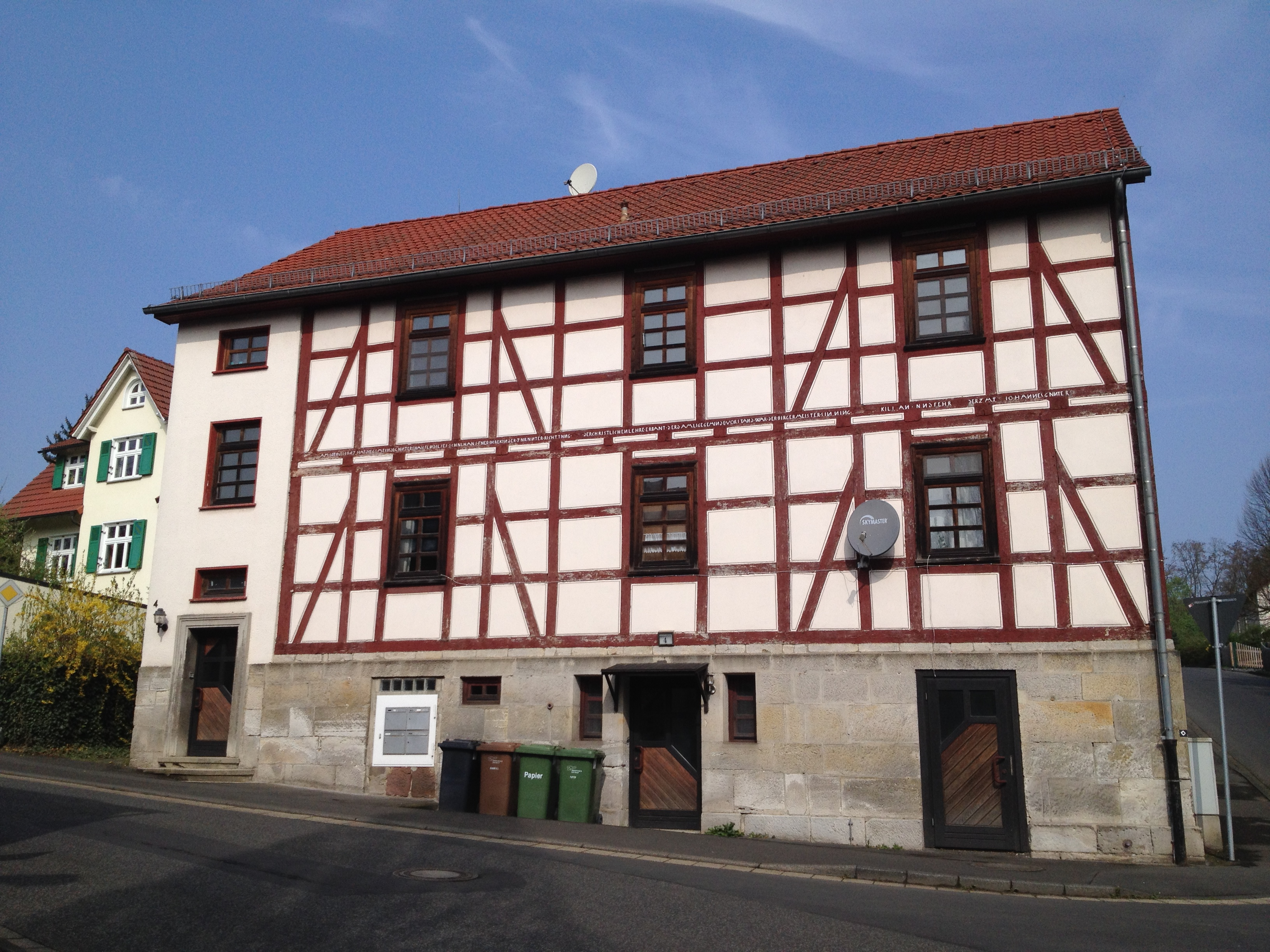 Eco Pfad Kulturgeschichte Guntershausen